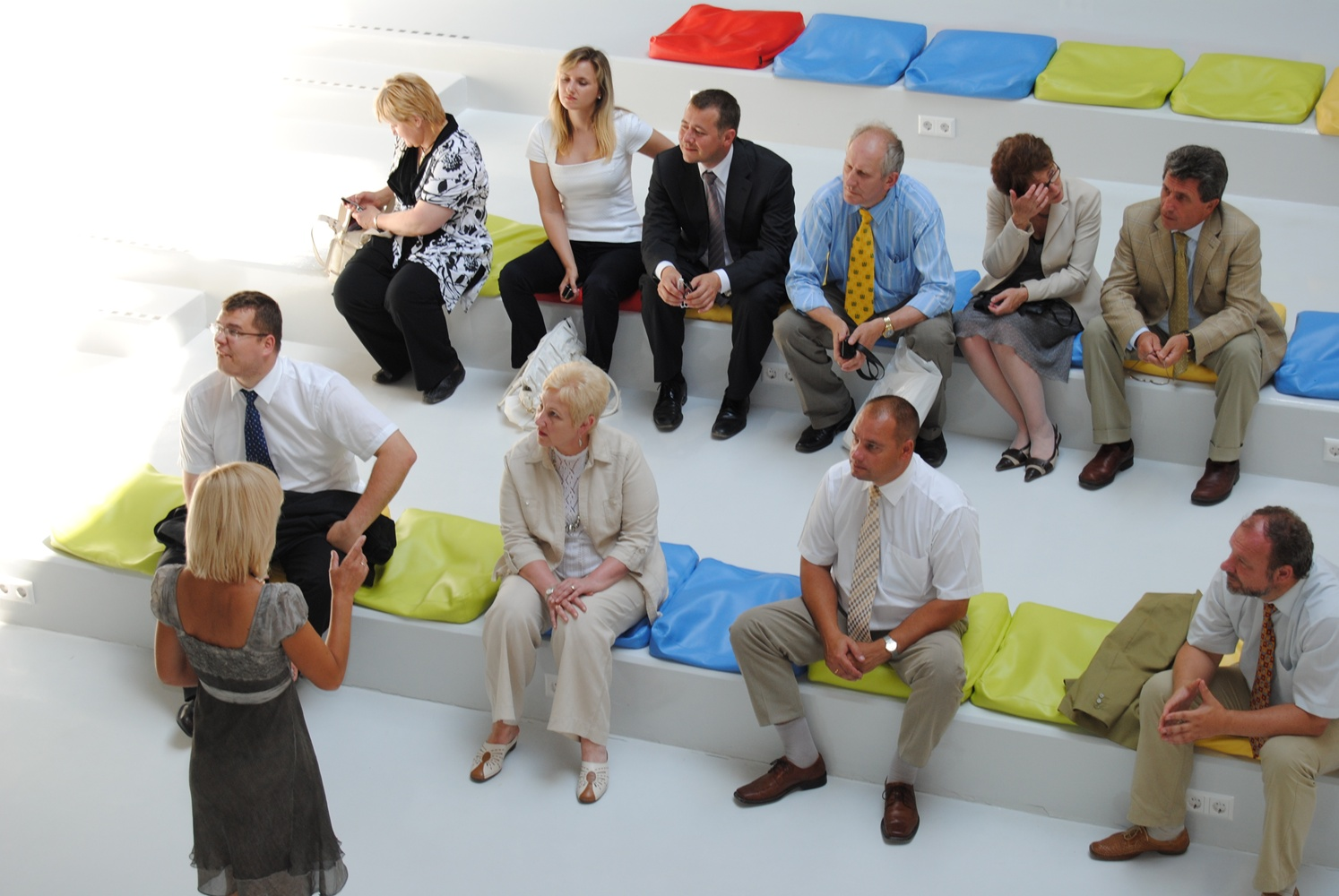 Lietuvas Seima priekšsēdētāja Irena Degutiene un Saeimas priekšsēdētājs Gundars Daudze viesojas Pārventas bibliotēkā Ventspilī. Foto: Saeima